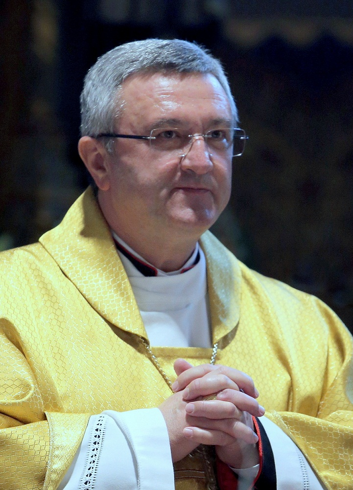 Veres András püspök (2015.01.06.)